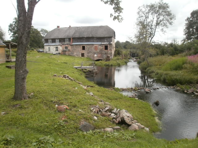 Veski Jogla jõel linnuse vastas. Veskitammi taga on Ungurpilsi paisjärv. Paremale jääb linnusekünka põhjanõlv.